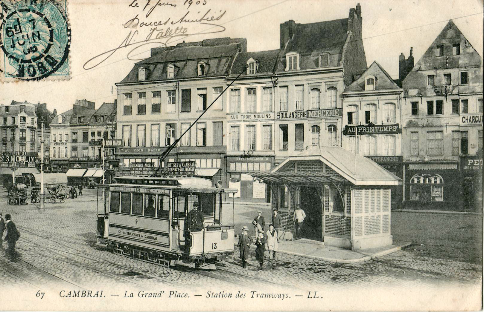 Carte postale ancienne éditée par LL n°67 : CAMBRAI - La Grand'Place - Station des Tramways